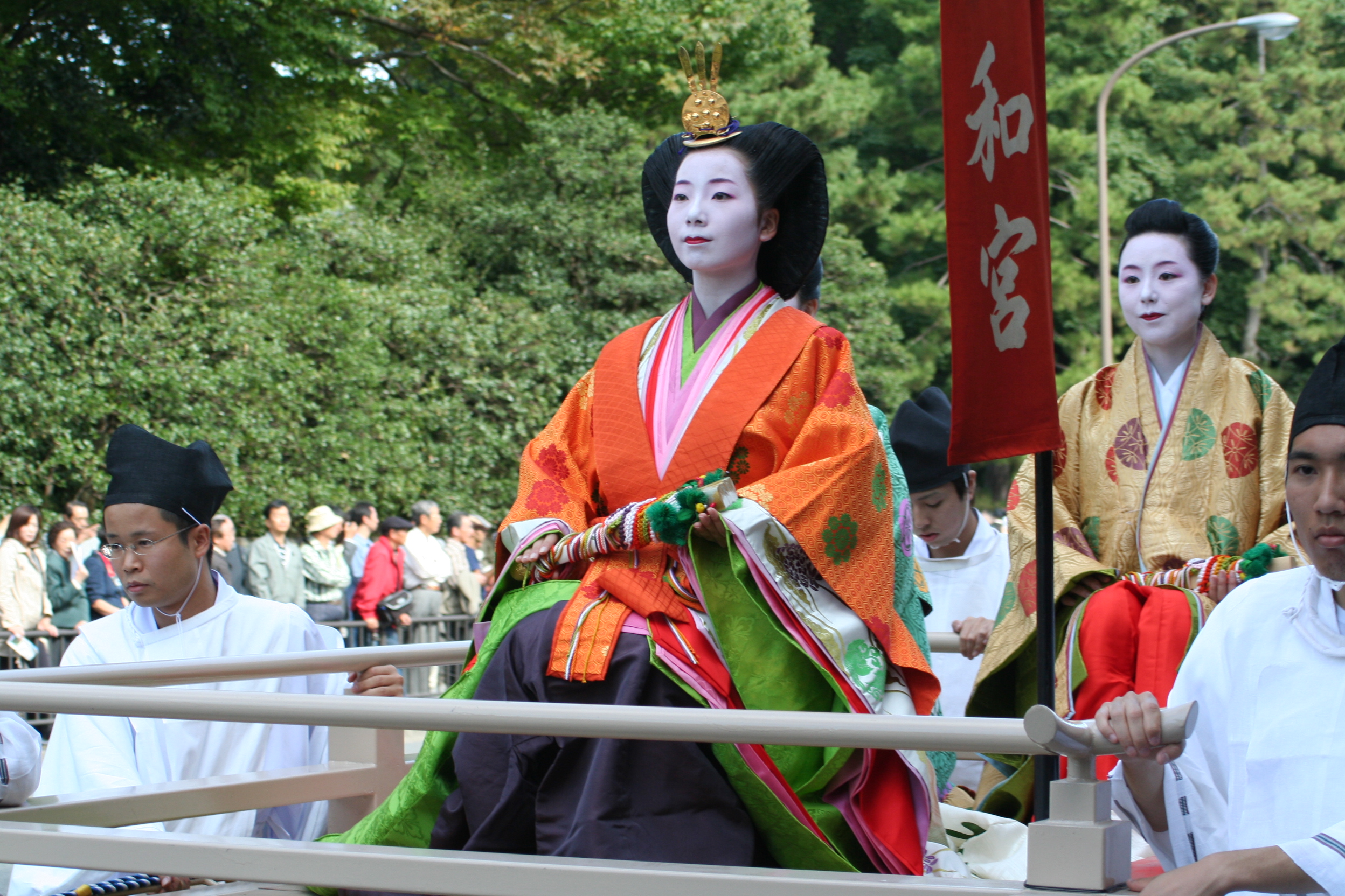 京都府京都市にて開催された時代祭。正午の御所から平安神宮までの行進の様子。2009年10月22日撮影。